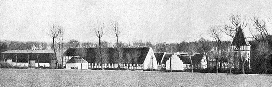 Risinge nævnes første gang i 1526. Risinge var krongods til 1661, da gården blev købt af Jens Madsen. Gården ligger i Flødstrup Sogn, Vindinge Herred, Ullerslev Kommune. Hovedbygningen er opført i 1750.